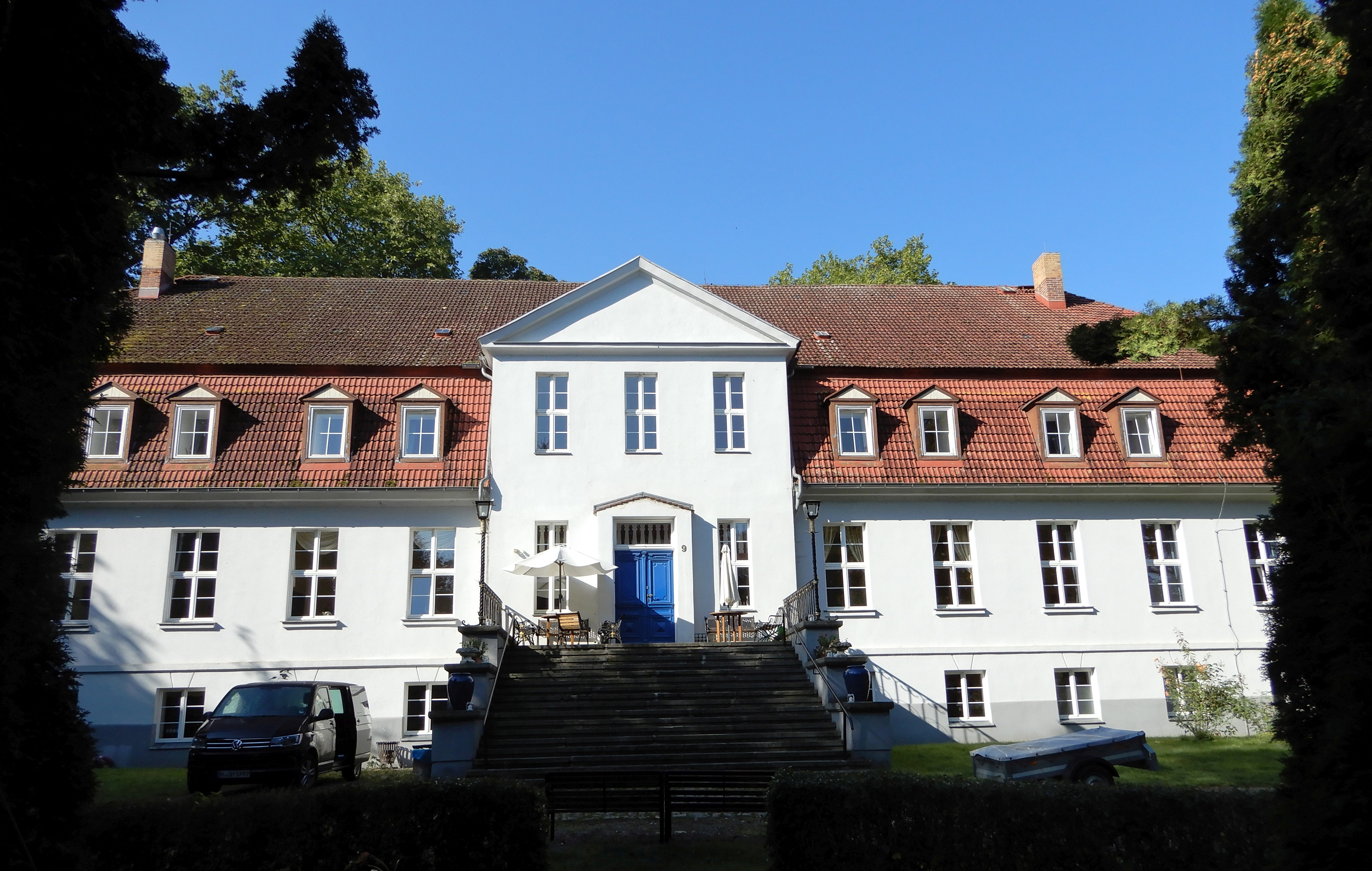 Vorderseite Gutshaus Groß-Markow